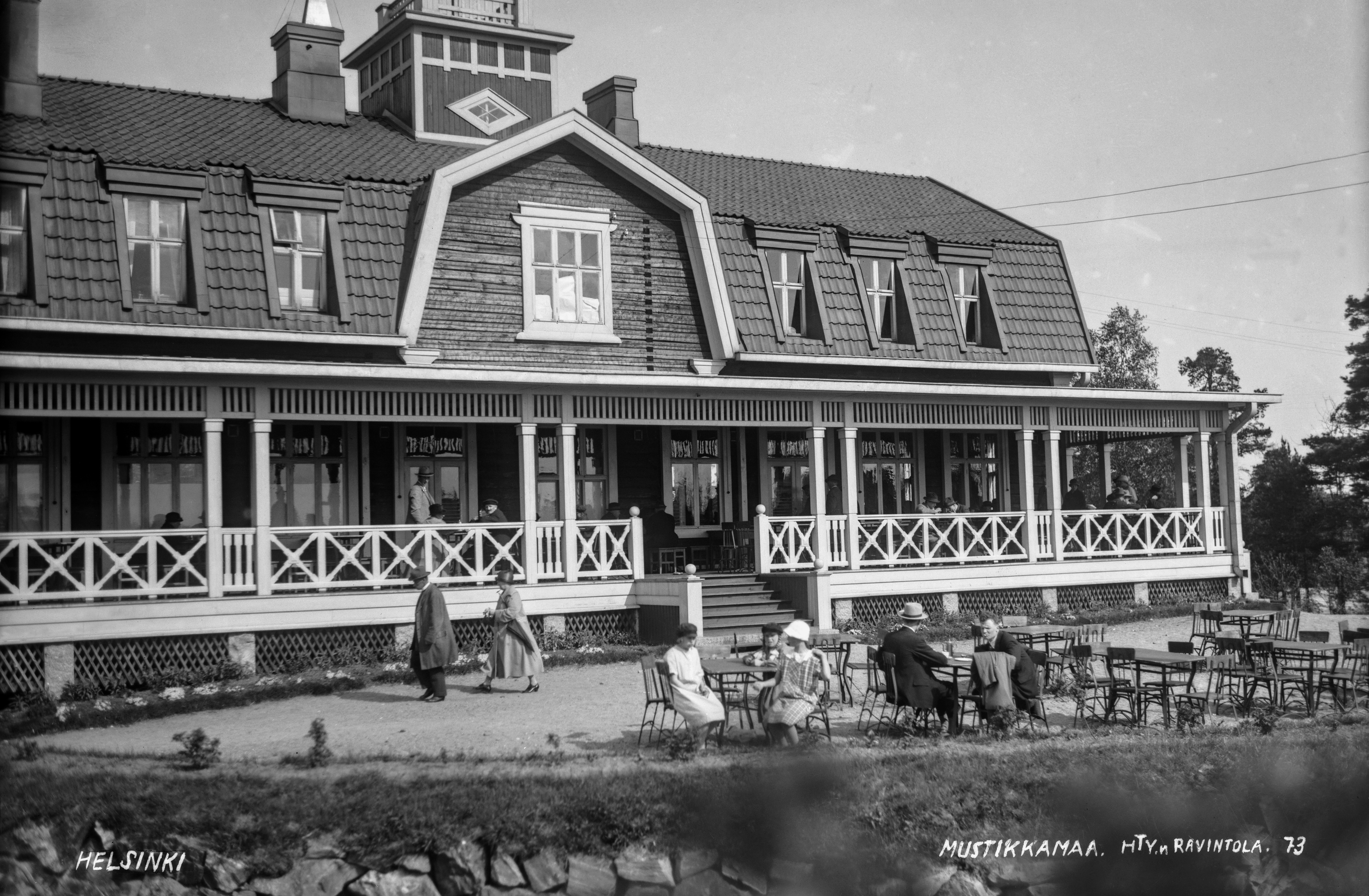 Mustikkamaa; Mustikkamaa. Helsingin työväenyhdistyksen ravintola. -- negatiivi vedos, lasi paperi pahvi, mv